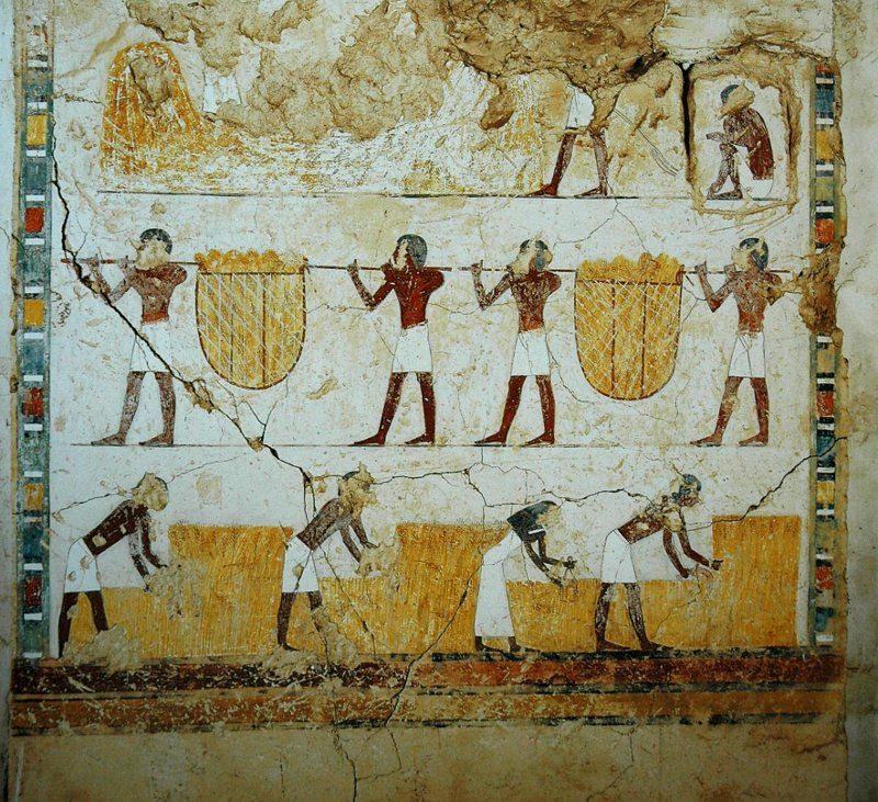 Getreideernte, Grab des Ineni (TT81)